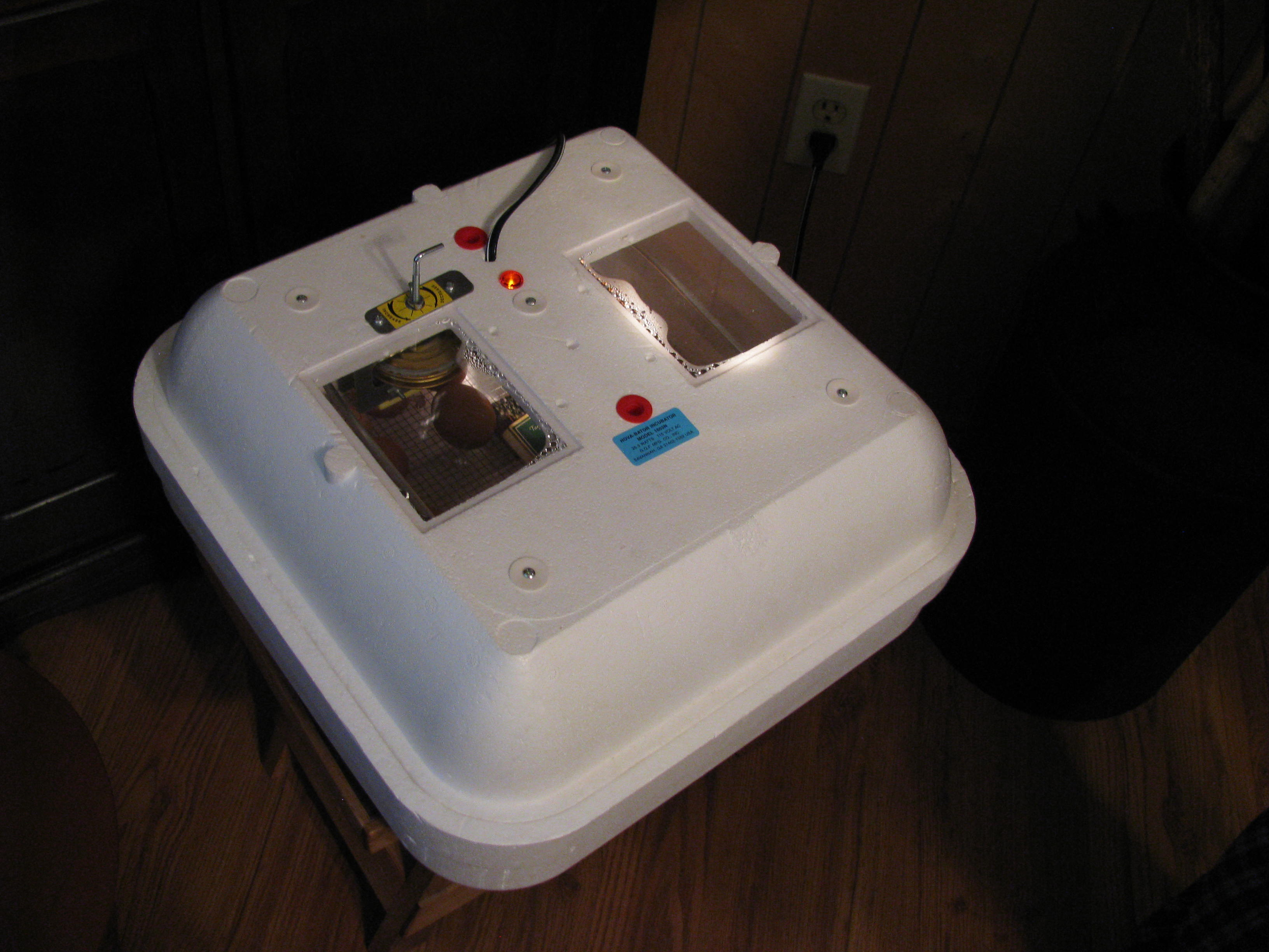 Incubator